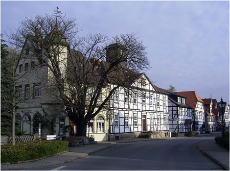 Lauenau